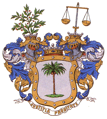 Vaakuna